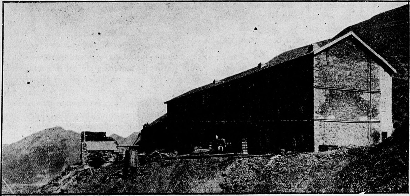 Maison pouvant loger 160 mineurs à 2000 mètres d'altitude. Vue prise pendant la construction en 1928.